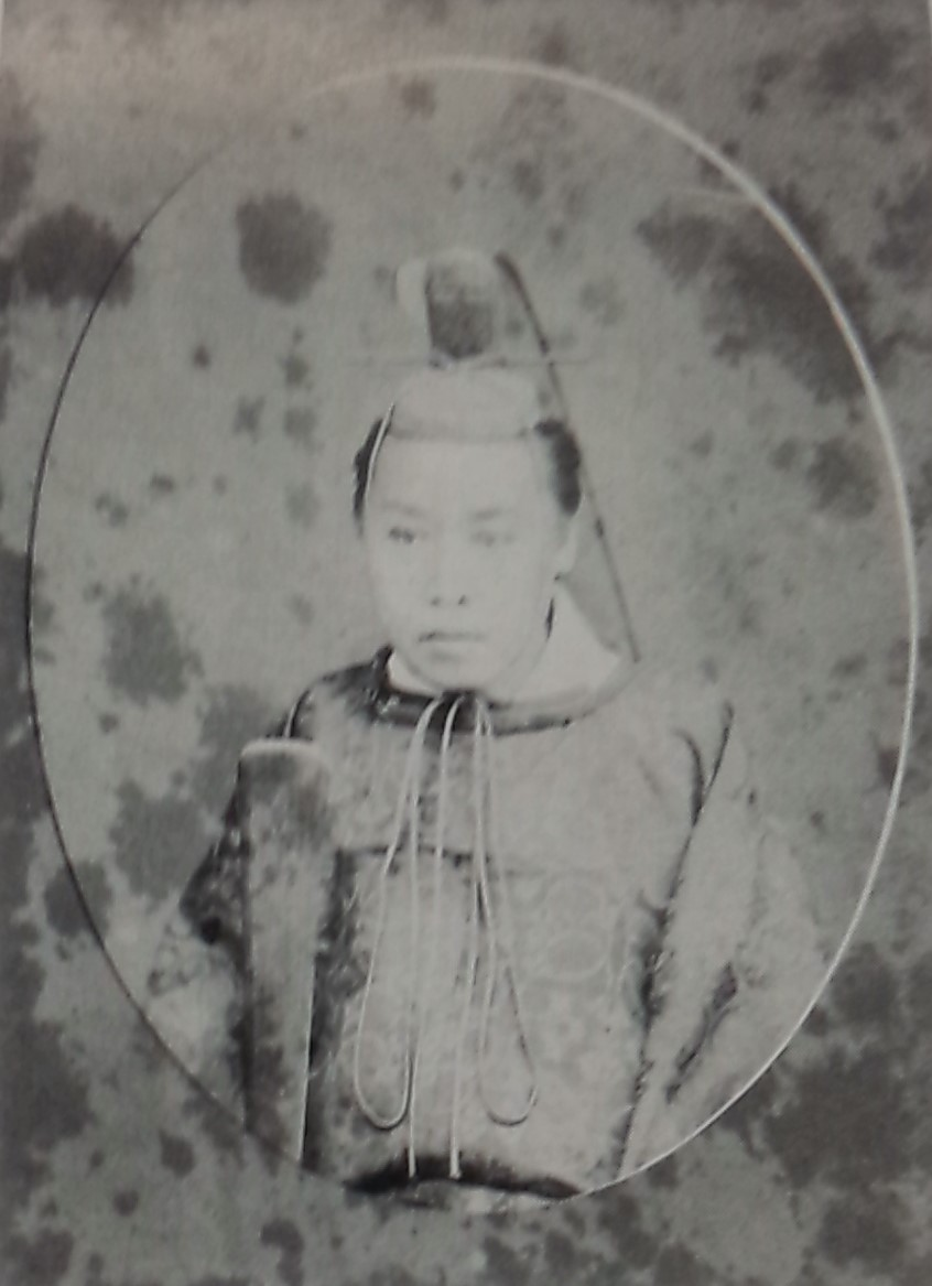 吉田良義の肖像写真。